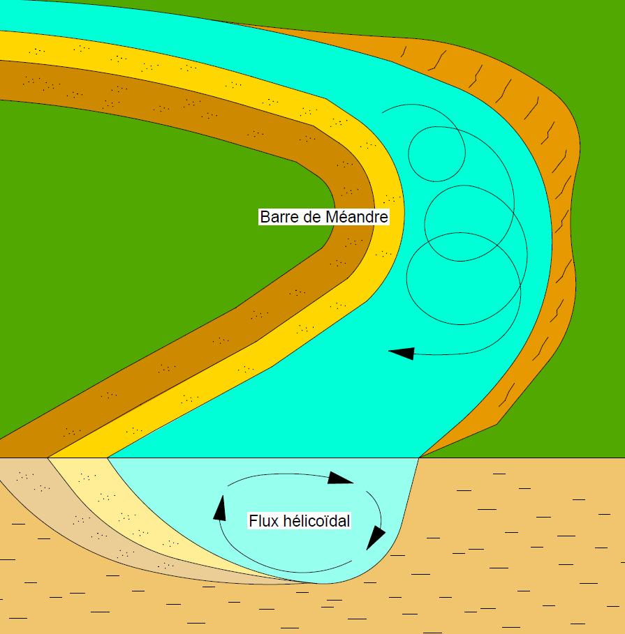 Schéma flux hélicoïdal